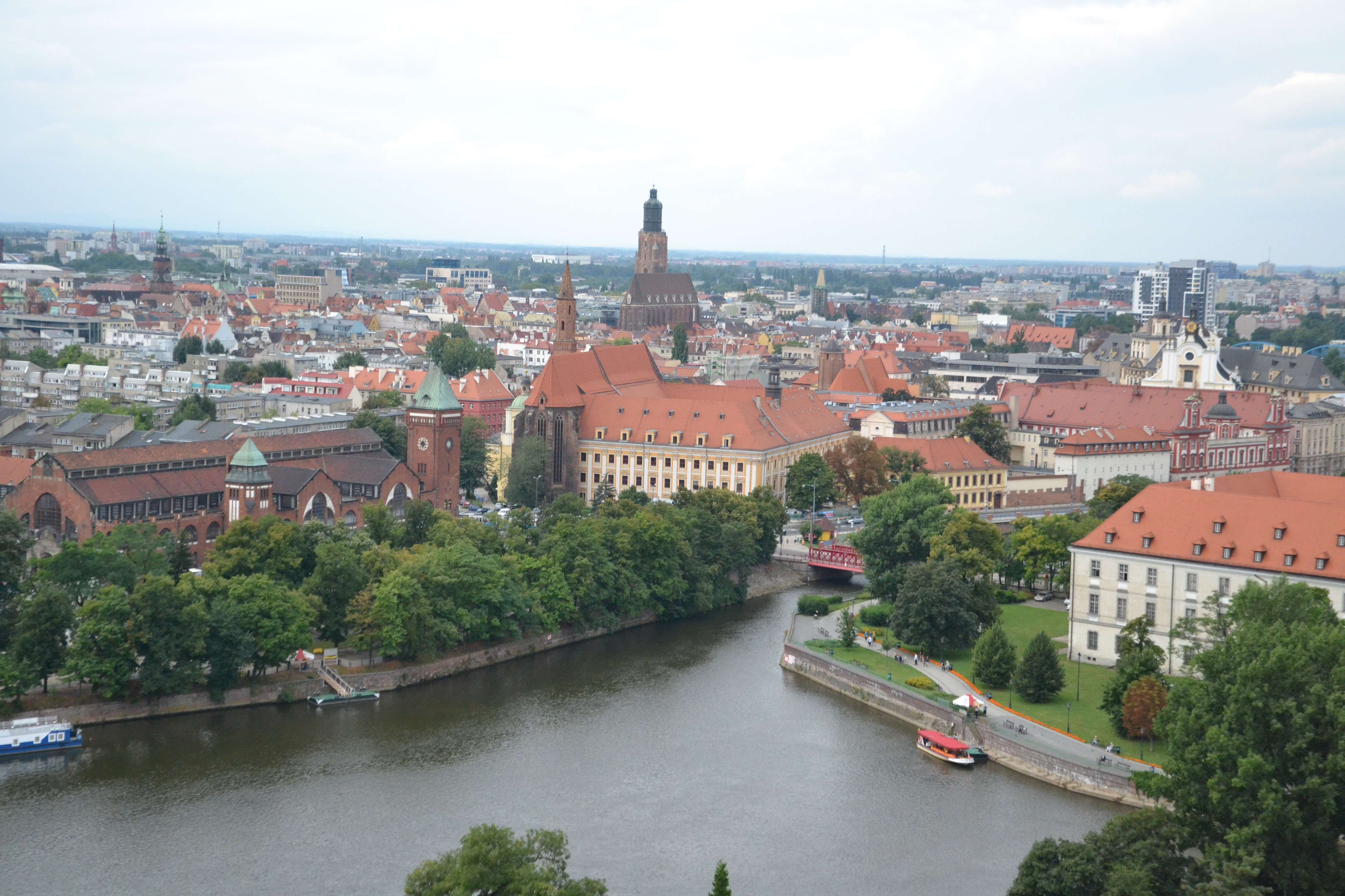 Wrocław - Bulwar Dunikowskiego i Włostowica